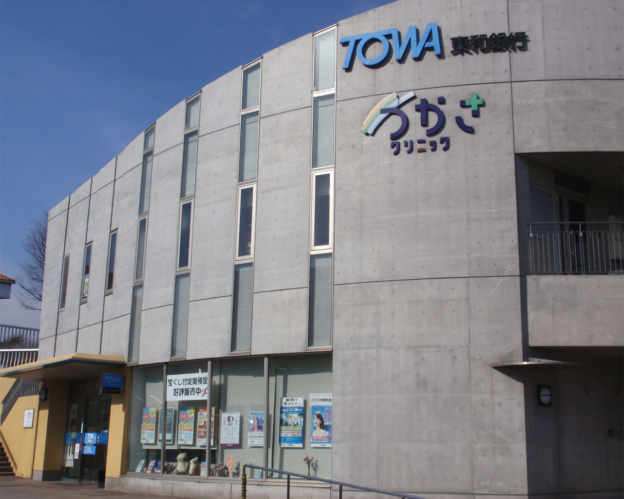 東和銀行 東松山支店高坂出張所（埼玉県東松山市松風台9-1） / TOWA-BANK, Takasaka Branch. (Matsukaze-dai 9-1, Higashimatsuyama-city, Saitama-pref, Japan)